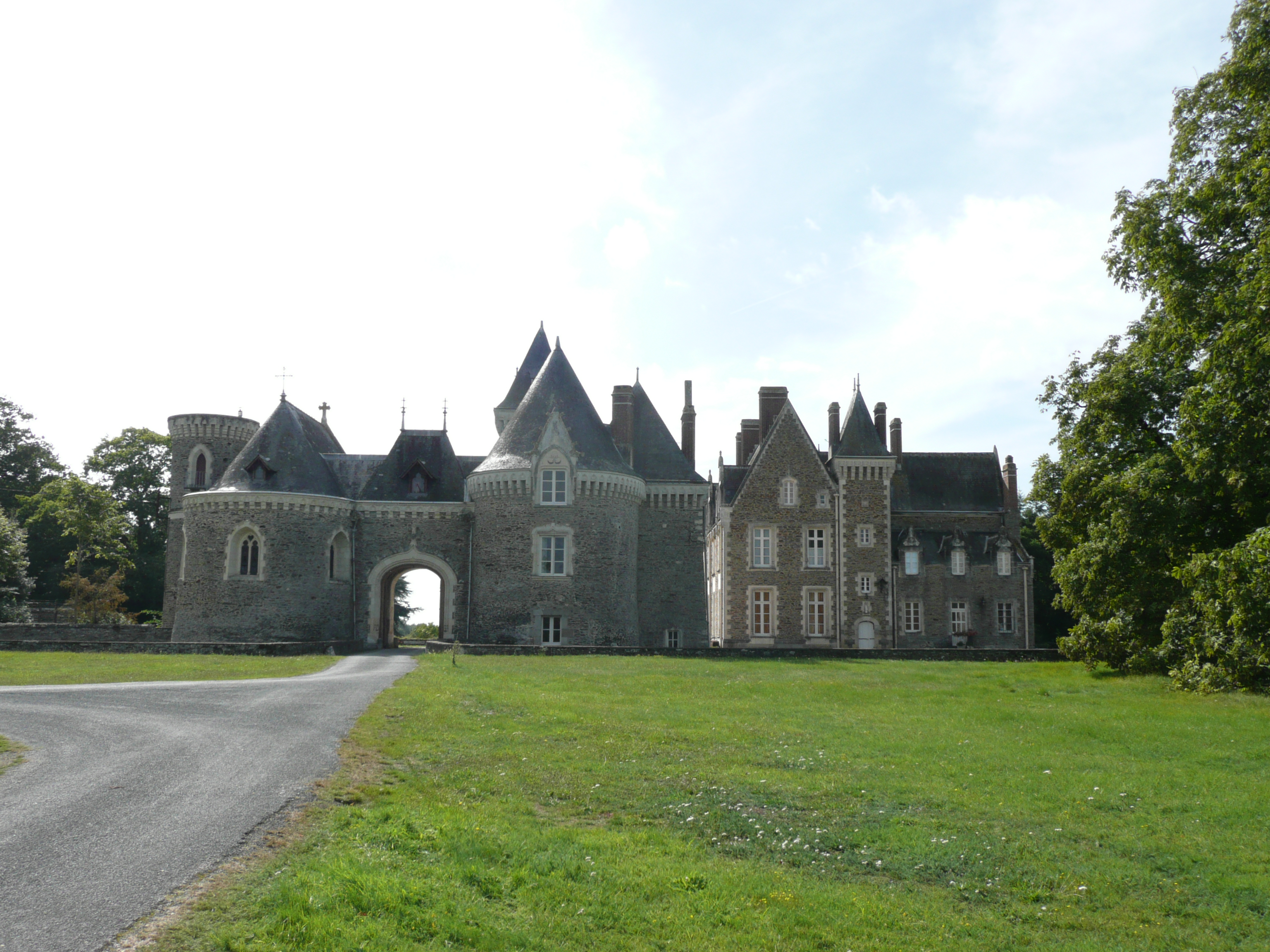 Freigné - Château de Bourmont